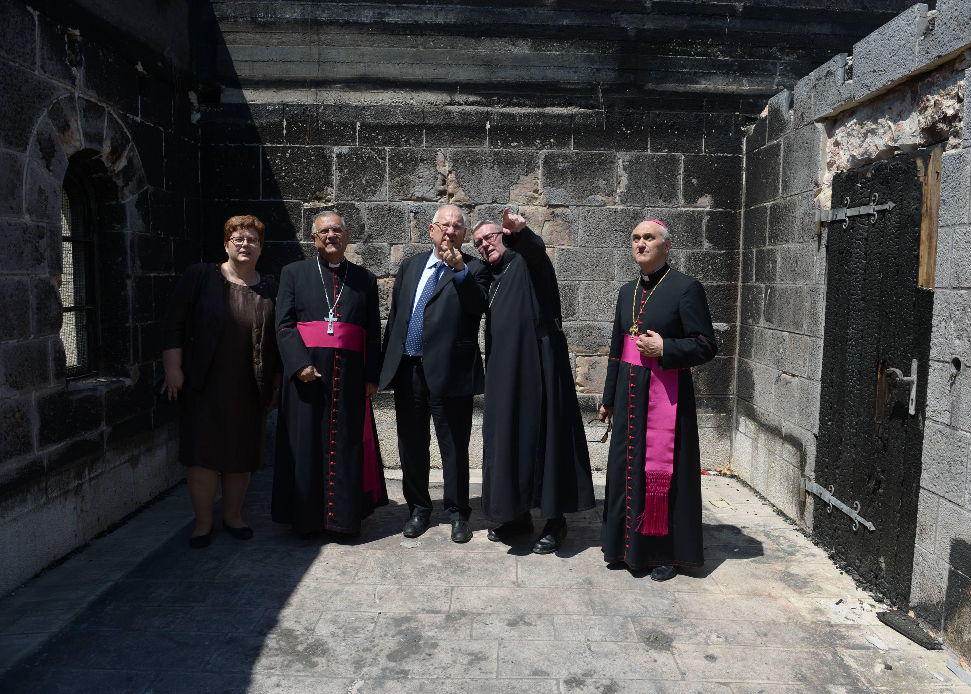 ביקור נשיא מדינת ישראל ראובן ריבלין בכנסיית הלחם והדגים לאחר הצתת חלק ממתחם הכנסייה, עם ראשי הכנסייה במקום